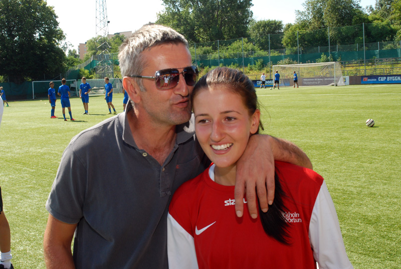 Nebojša Novaković and daughter Daniella Novaković in July 2013